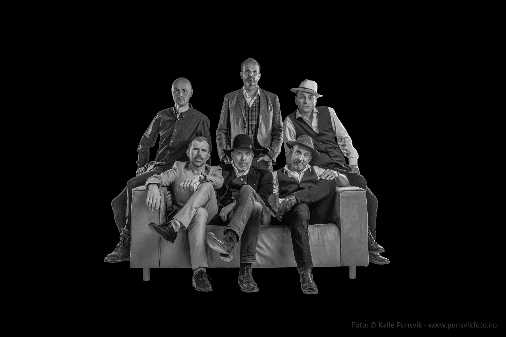 Bilde av bandet Groms Plass, Narvik. Av fotograf Kalle Gjesvik april 2018.